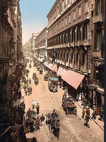 Cartolina ricolorata fine '800 della Via Toledo in Napoli - Italia.